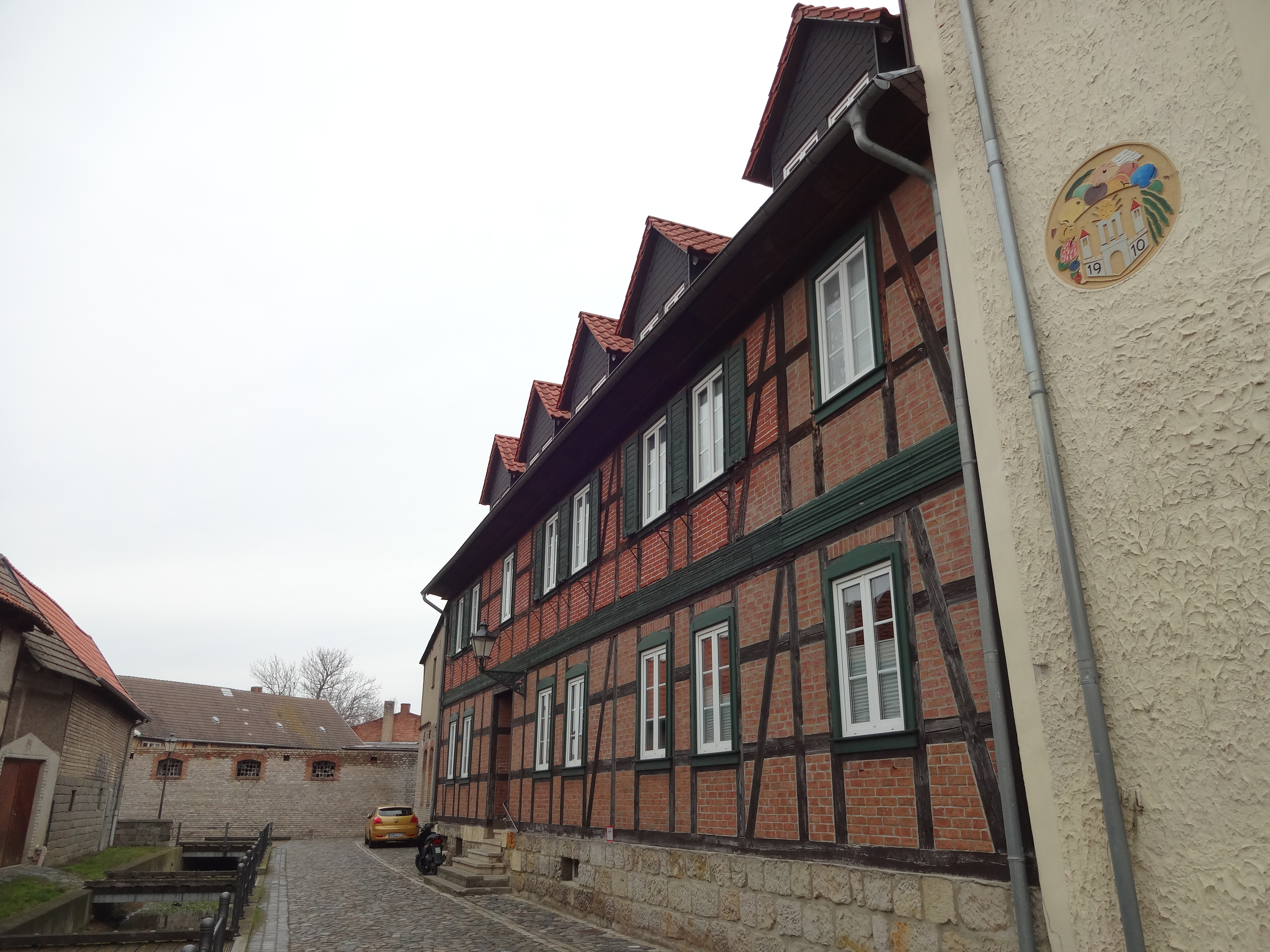 ehemals denkmalgeschütztes Fachwerkhaus in der Pfeifferstraße 4 in Derenburg, Ortsteil von Blankenburg (Harz)